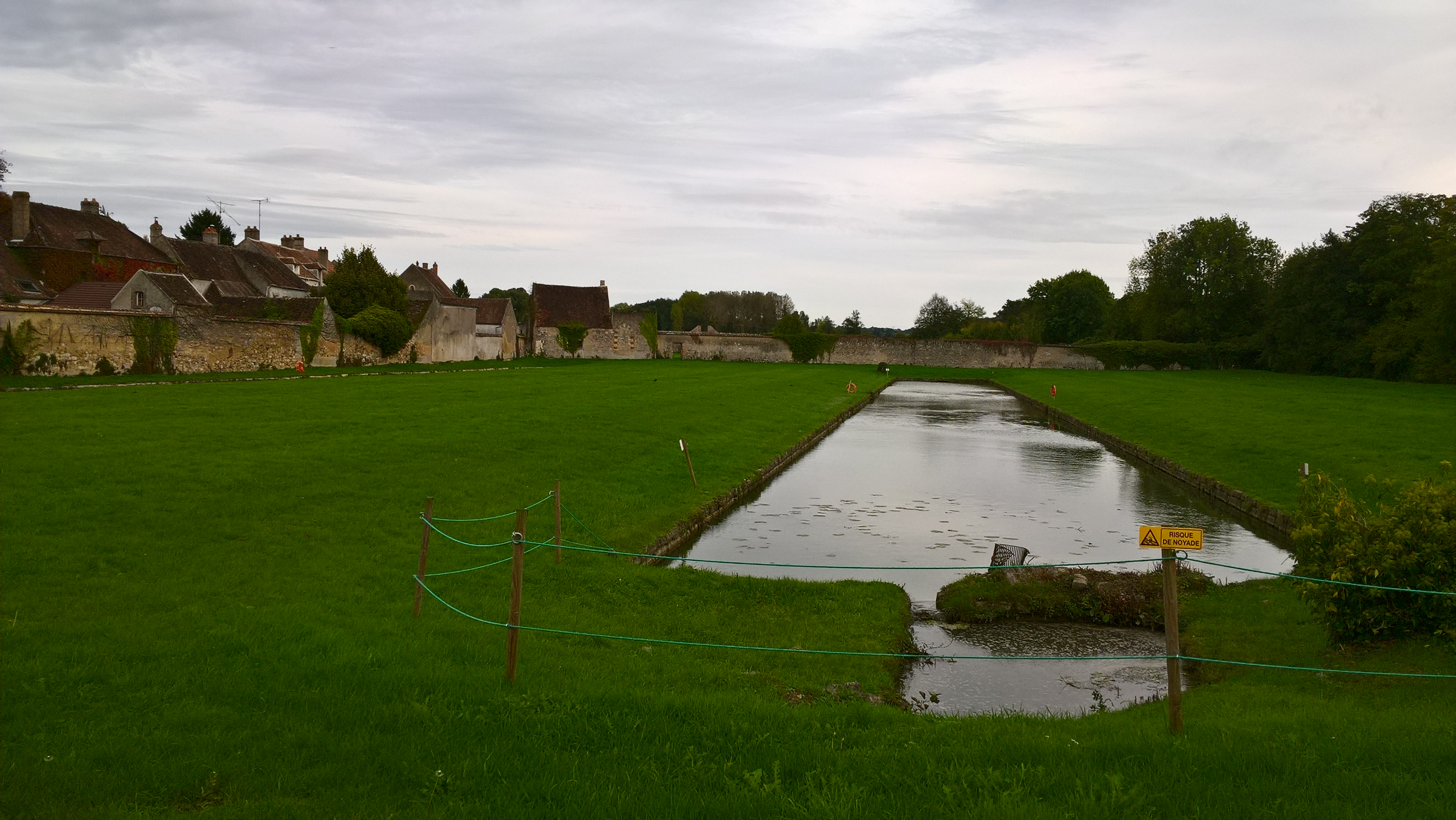 Vallery, bassin des anciens jardins du château.